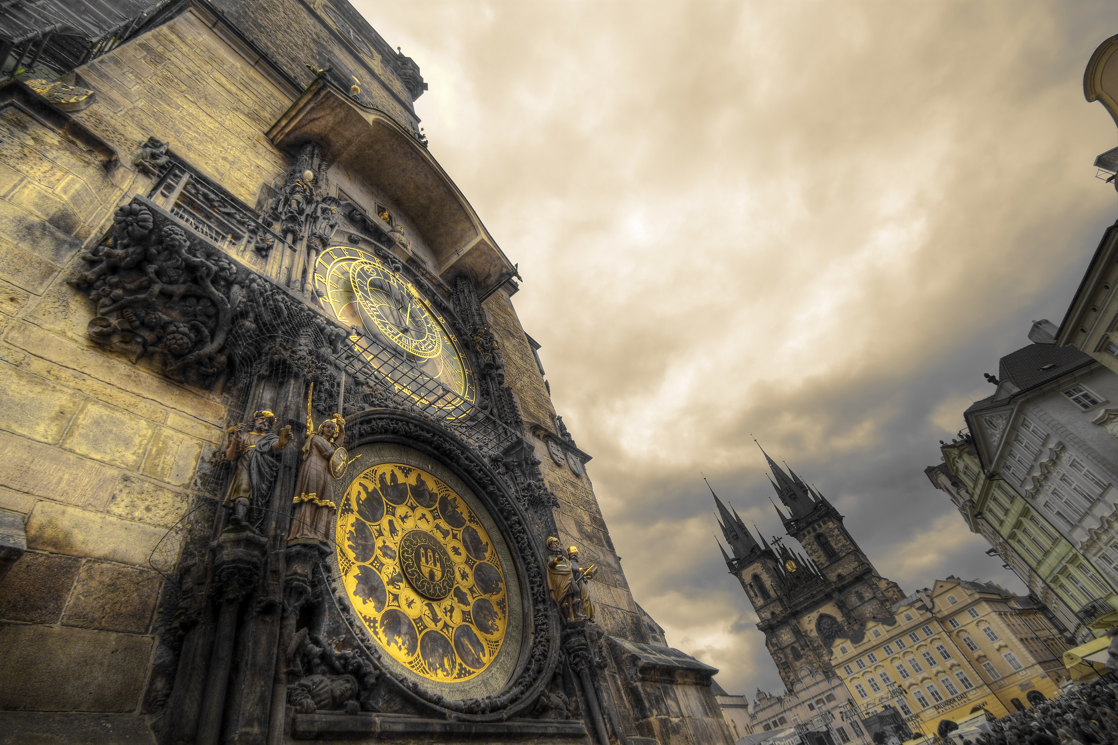 Radnice Staroměstská (Staré Město), Praha 1, Staroměstské nám. 1/3, Staré Město